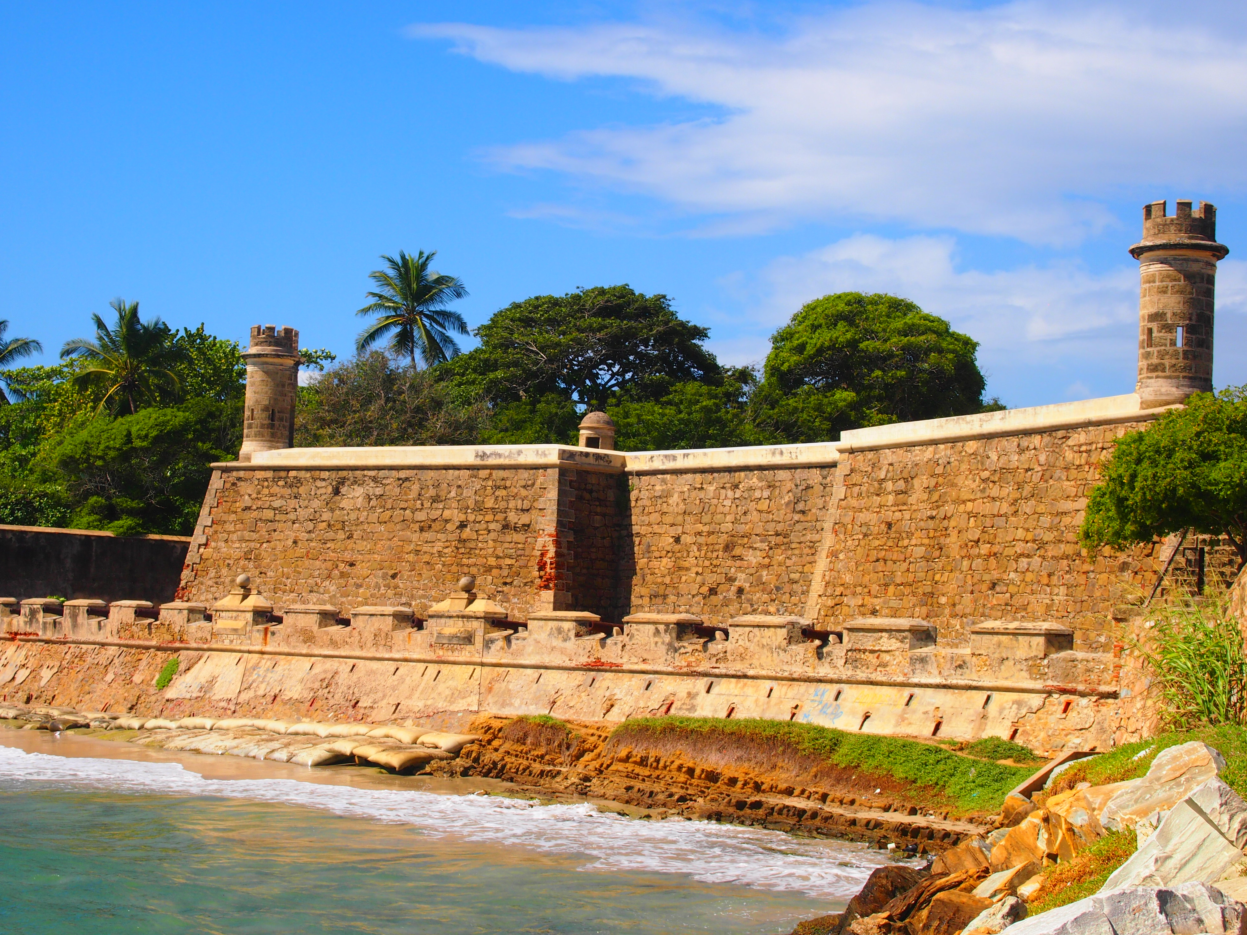 Viaje Isla de Margarita